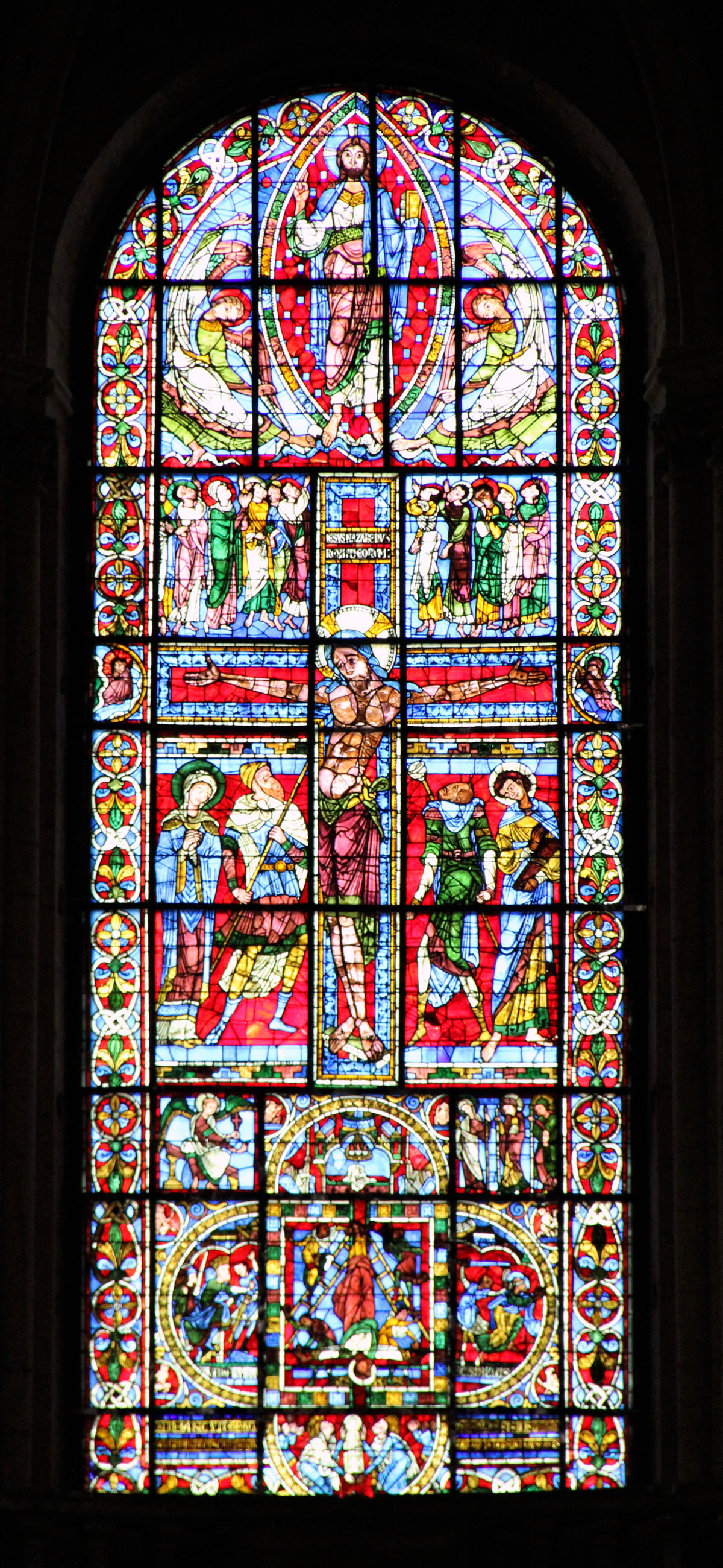 Vitrail de la crucifixion. Chevet de la cathédrale Saint-Pierre. Poitiers.